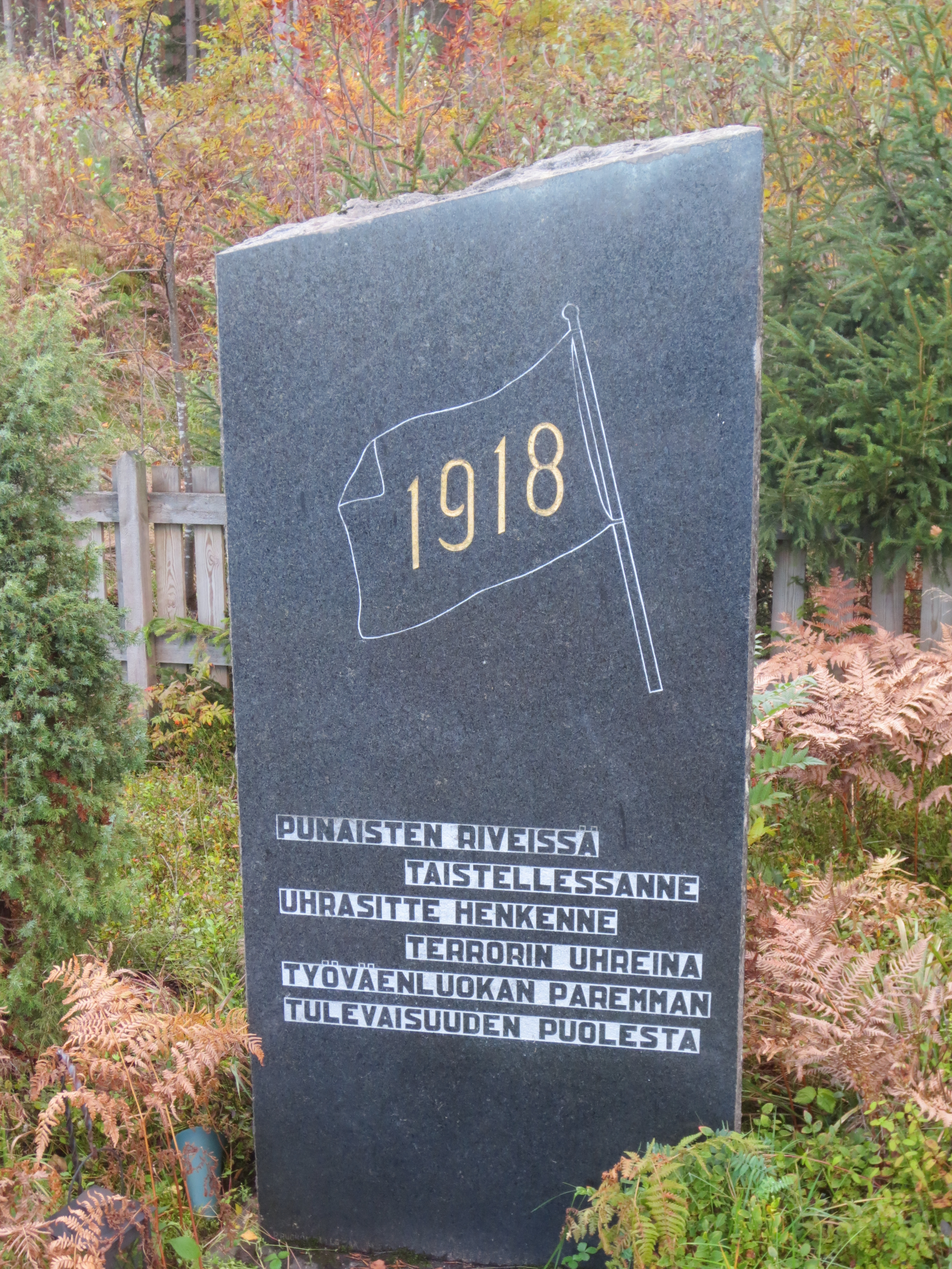 Teloitettujen punaisten muistomerkki vuodelta 1955 Ketunnummella Nurmijarvellä